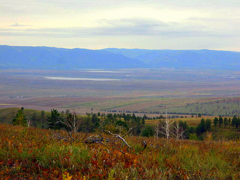 Вид на Убукунские озёра с юга с хребта Моностой. Вдали - Хамар-Дабан.